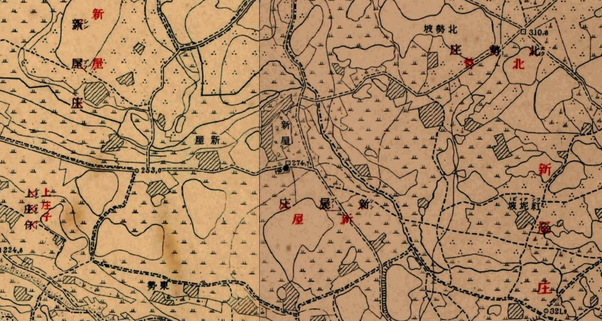 1921年《臺灣堡圖》（紅字版），新屋 (大字)周遭截圖。